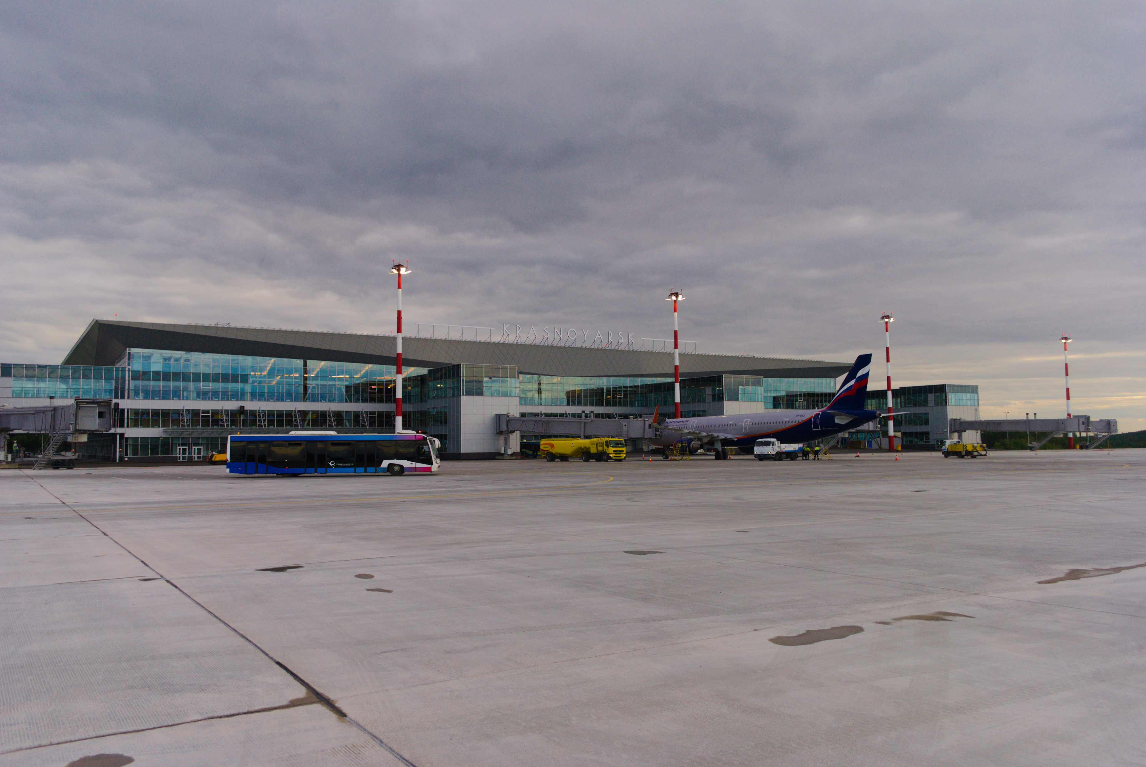 Аэропорт Красноярск, вид с перрона (2018.08)